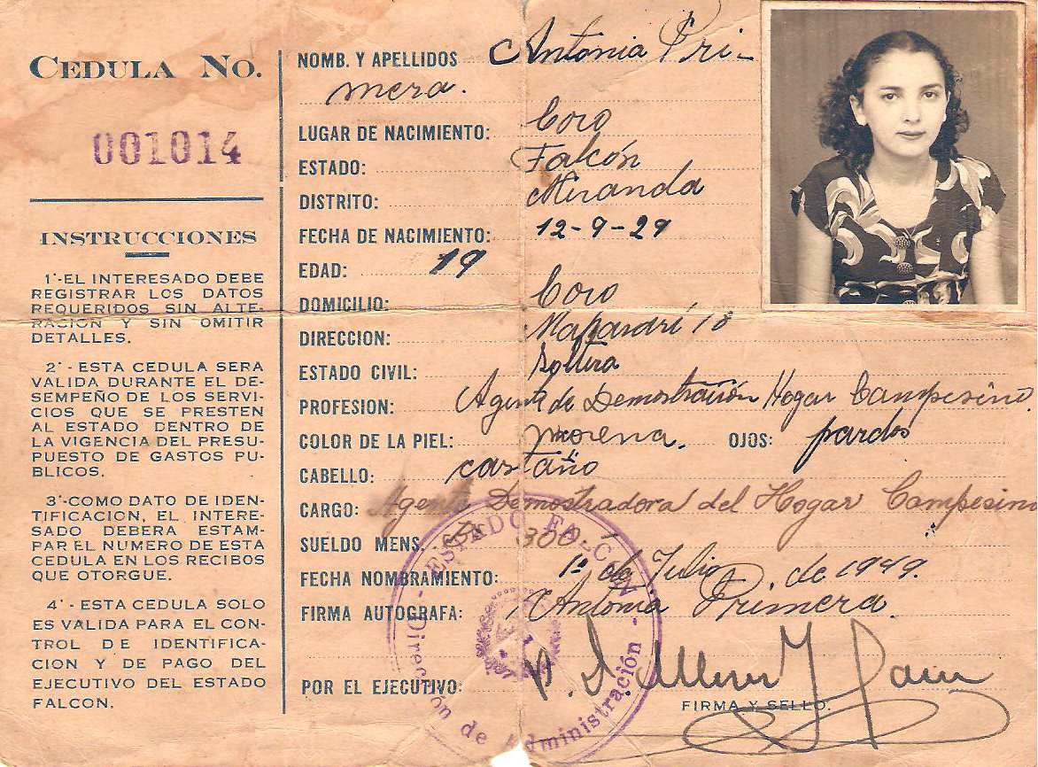 Cédula de Venezuela (1949) de Antonia Primera. Nombre y apellidos: Antonia Primera Lugar de nacimiento: Coro Estado: Falcón Distrito: Miranda Fecha de nacimiento: 12-9-[19]29 Edad: 19 Domicilio: Coro Dirección: Mapararí / 8 Estado civil : soltera Profesión: Agente de demostración hogar campesino Color de la piel: morena Ojos: pardos Cabello: castaño Cargo: Agente demostradora del Hogar Campesino Sueldo mensual: 300 Fecha nombramiento: 1° de Julio de 1949 Firma autografa: Antonia Primera Por el ejecutivo ... Firma y sello